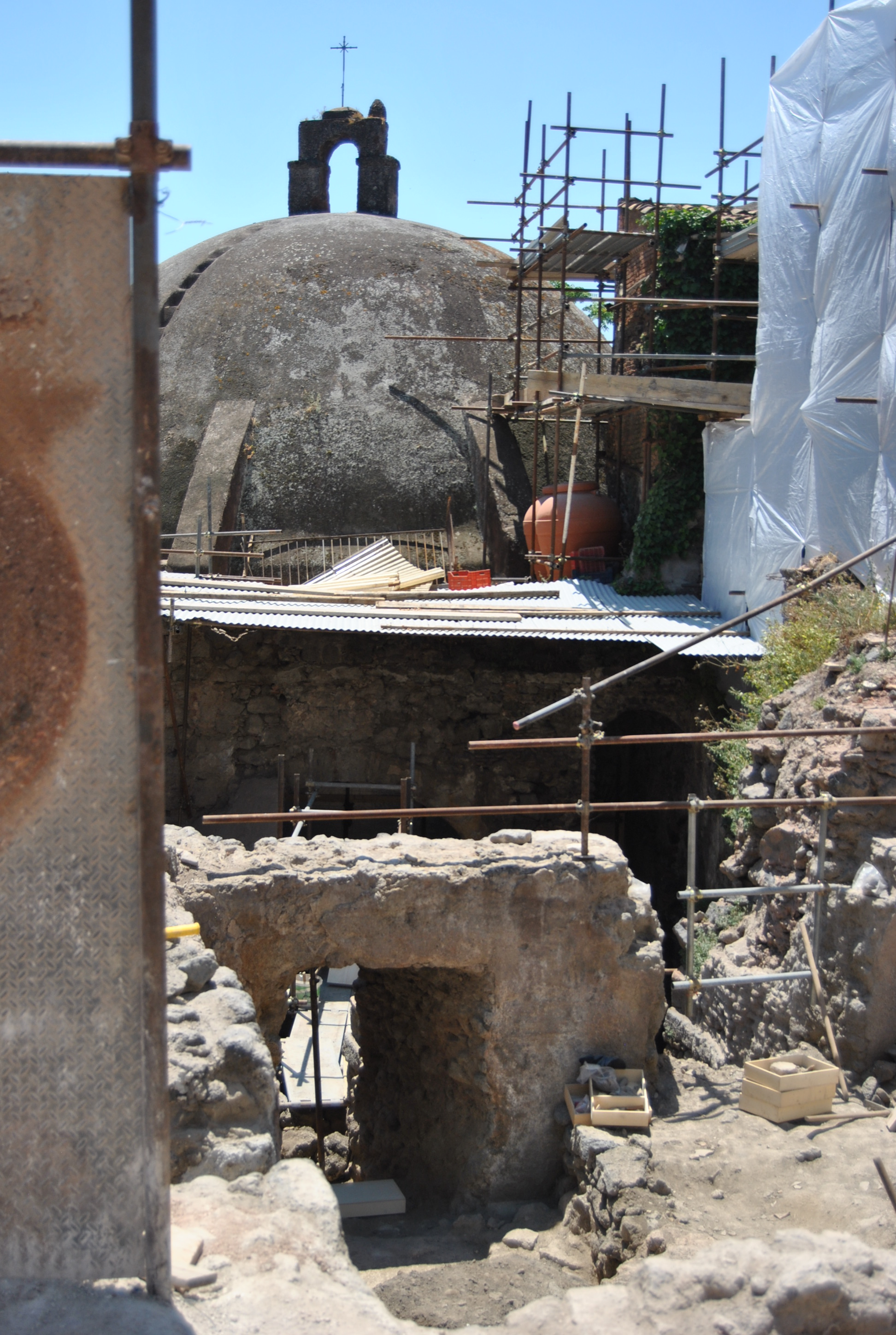 Cupola della chiesa di Santa Maria della Rotonda, dopo i lavori di maggio 2015.